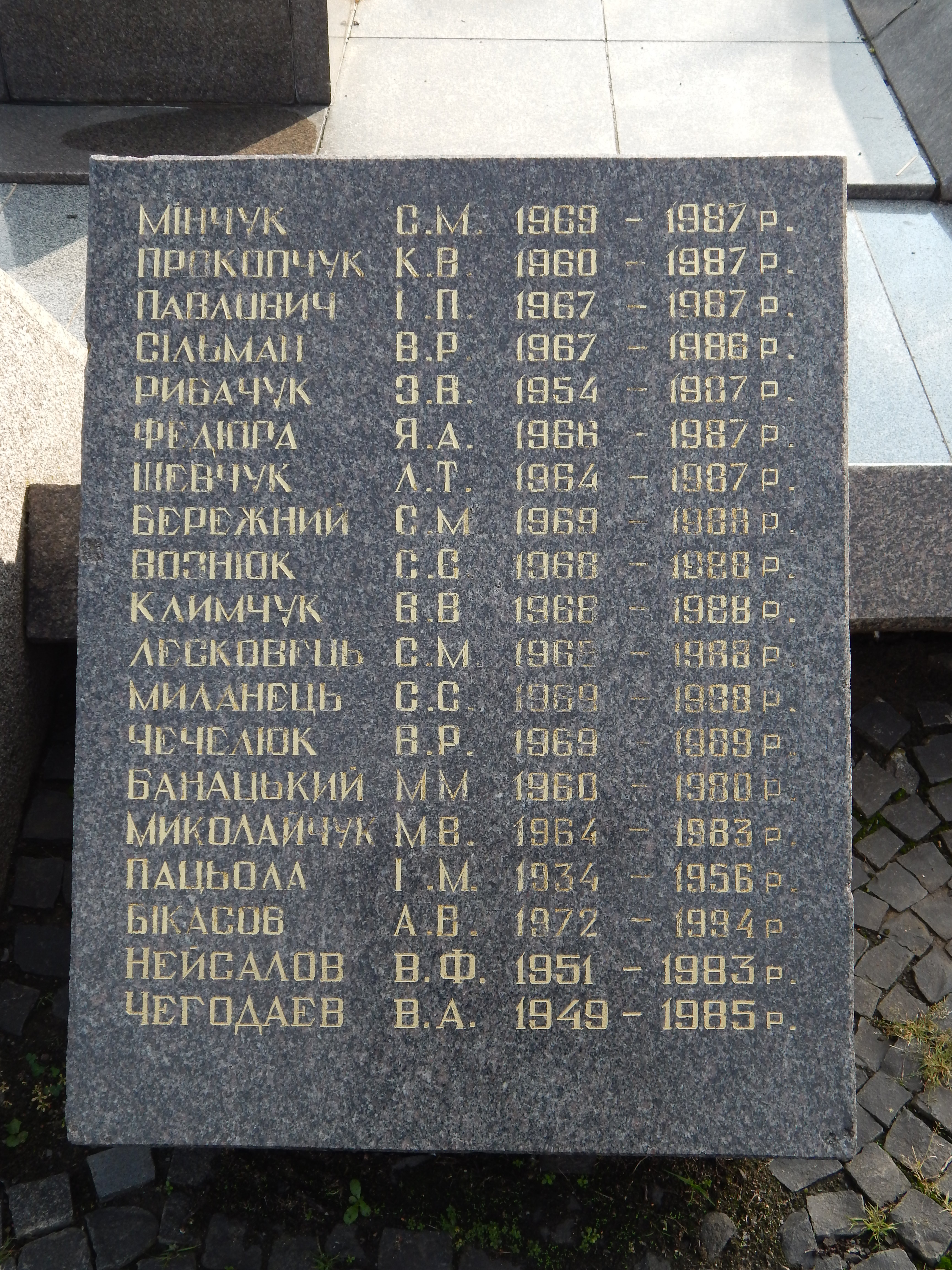 Пам'ятний знак на честь загиблих в локальних війнах, Рівне, вул. Короленка, 8